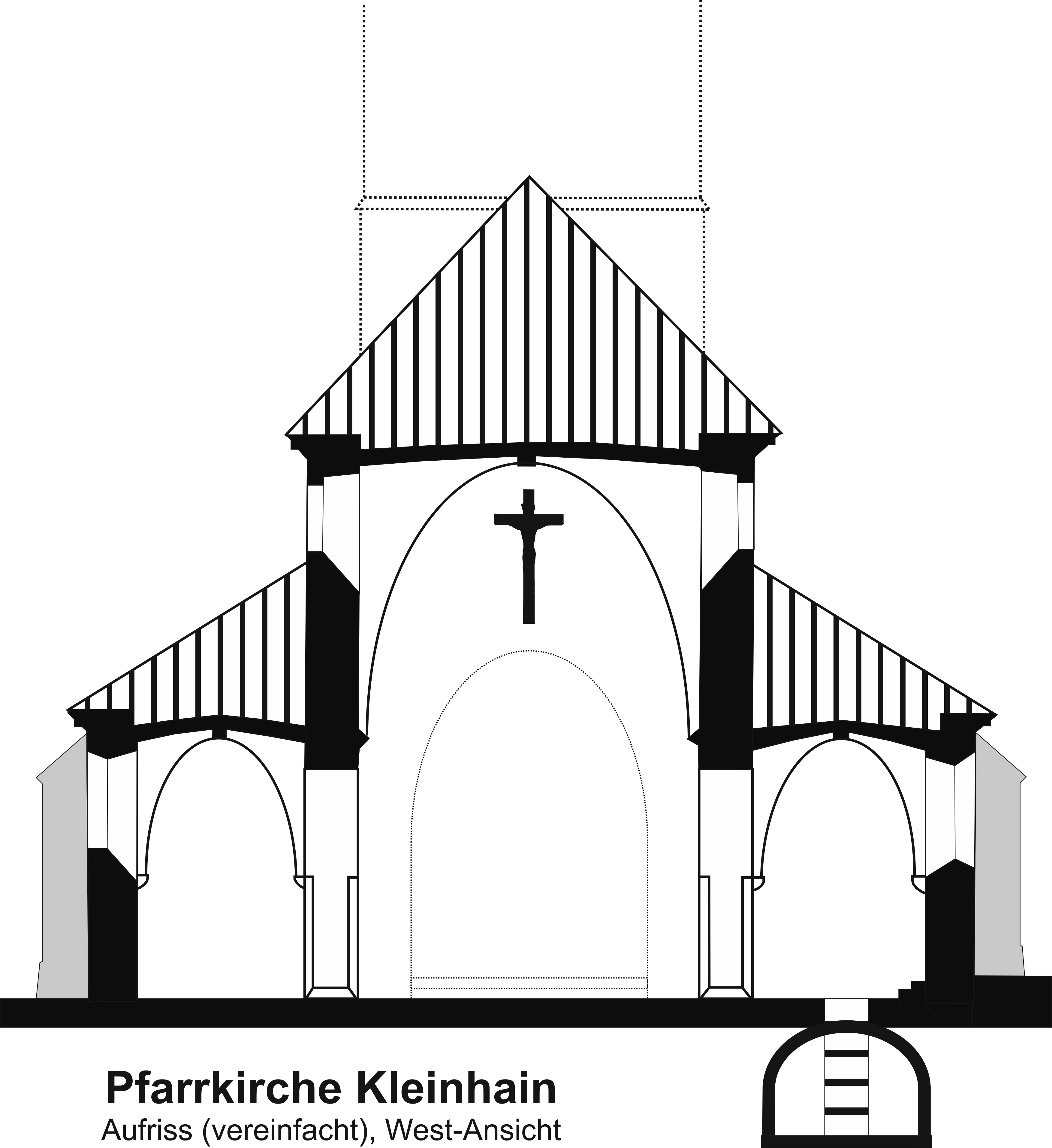 Aufriss der Pfarrkirche Kleinhain, Diözese St. Pölten - Westansicht